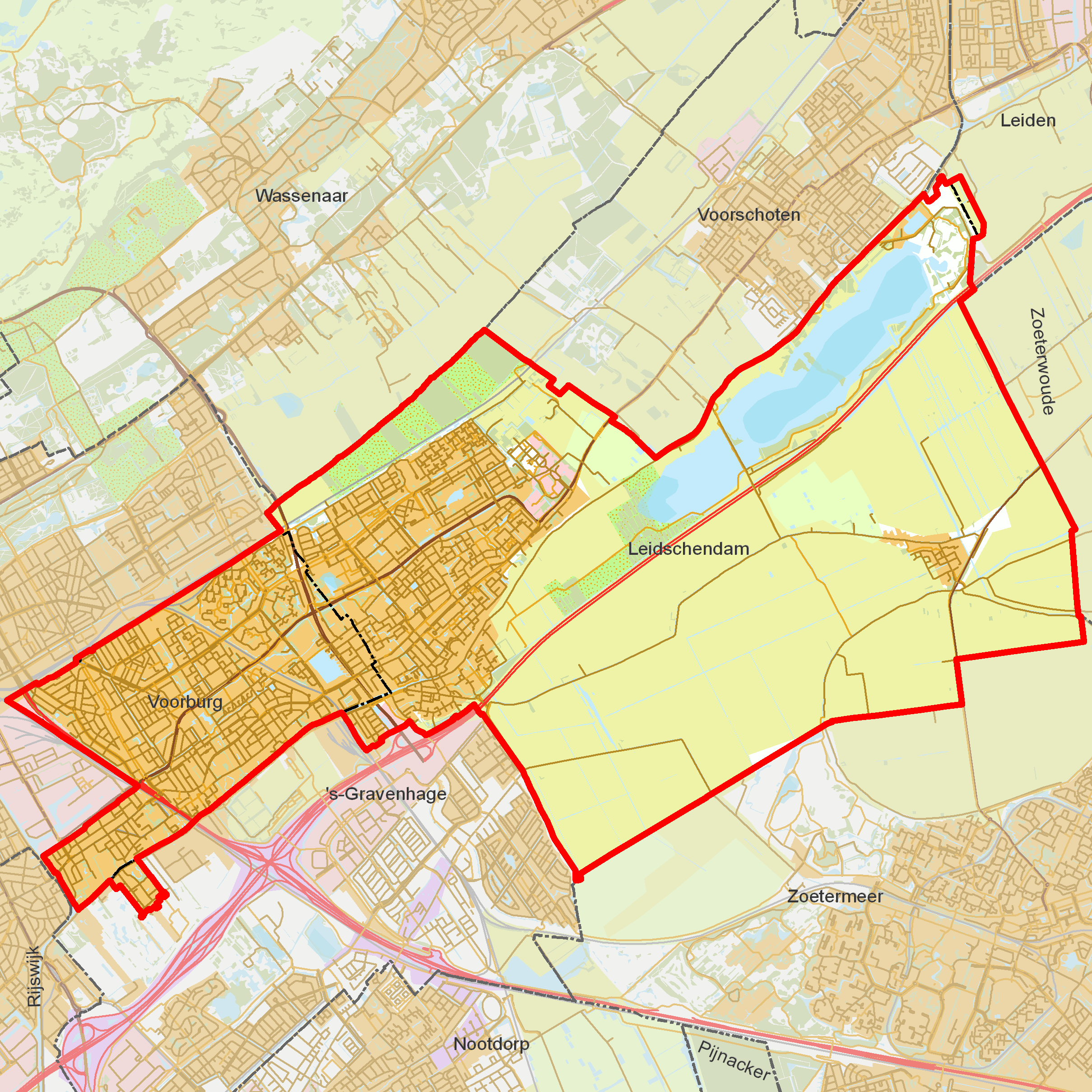 BAG woonplaatsen - Gemeente Leidschendam-Voorburg.png